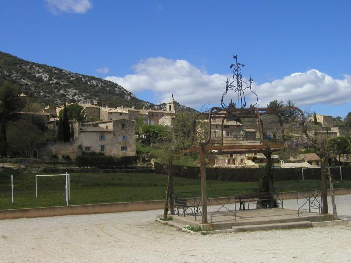 Commune de Maubec (Vaucluse) vue du vieux village photo personnelle du 20 avril 2005 Turris